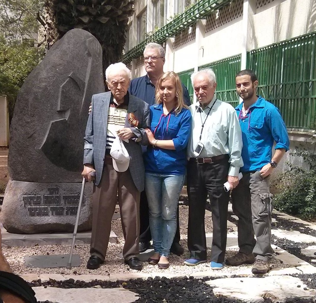 סמיון פלדמן, ניצול המרד בסוביבור, ואסיר ציון לזר לוברסקי, לצד חניכי תנועת הנוער העובד והלומד ואנדרטה לזכרו של אלכסנדר פצ'רסקי, מנהיג המרד.